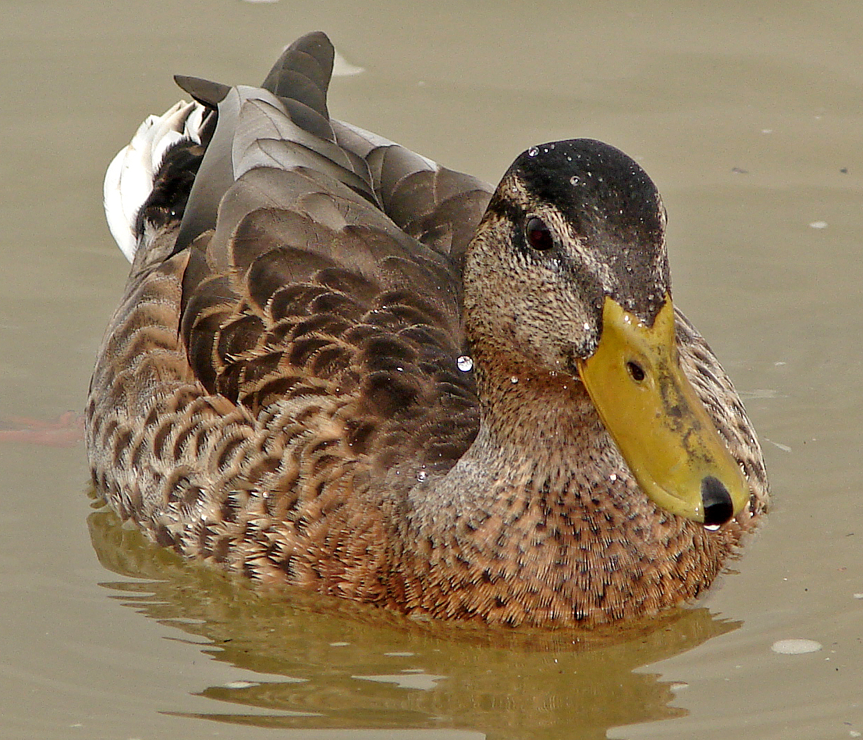 Lieu : Volendam (Hollande) Canard colvert (Mallard)